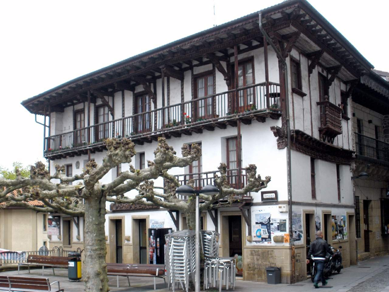 Paisaje urbano de Oiartzun (Gipuzkoa)